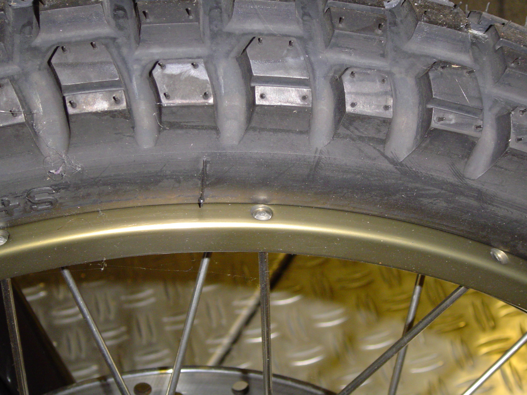 Kreuzspeichenrad waarbij duidelijk zichtbaar is, dat deze kruiselings gespaakt is. Kruisspaken maken het gebruik van tubelessbanden mogelijk.